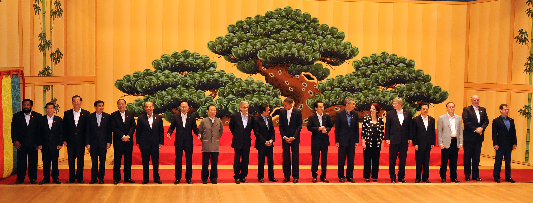 El Presidente de la República, Sebastián Piñera, participó en la Fotografía Oficial de los Líderes APEC 2010.